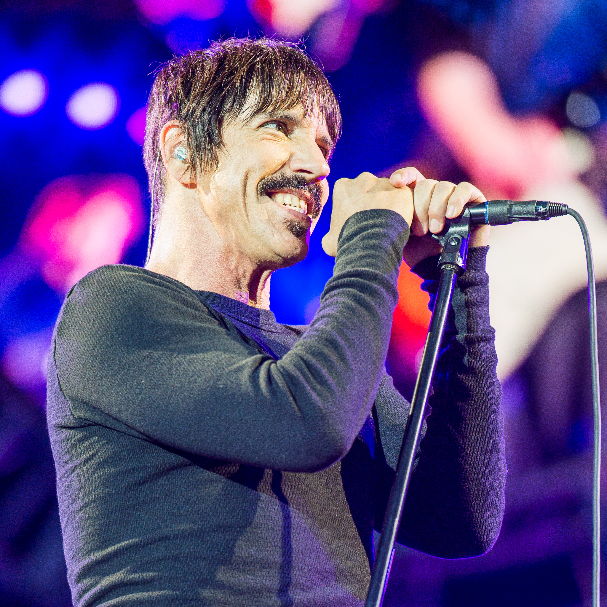 ARGO-Konzerte,Anthony Kiedis,Festival,Konzert,Livekonzert,Livemusik,Musik,Red Hot Chili Peppers,RiP,Rock im Park 2016,Seat Zeppelin Stage